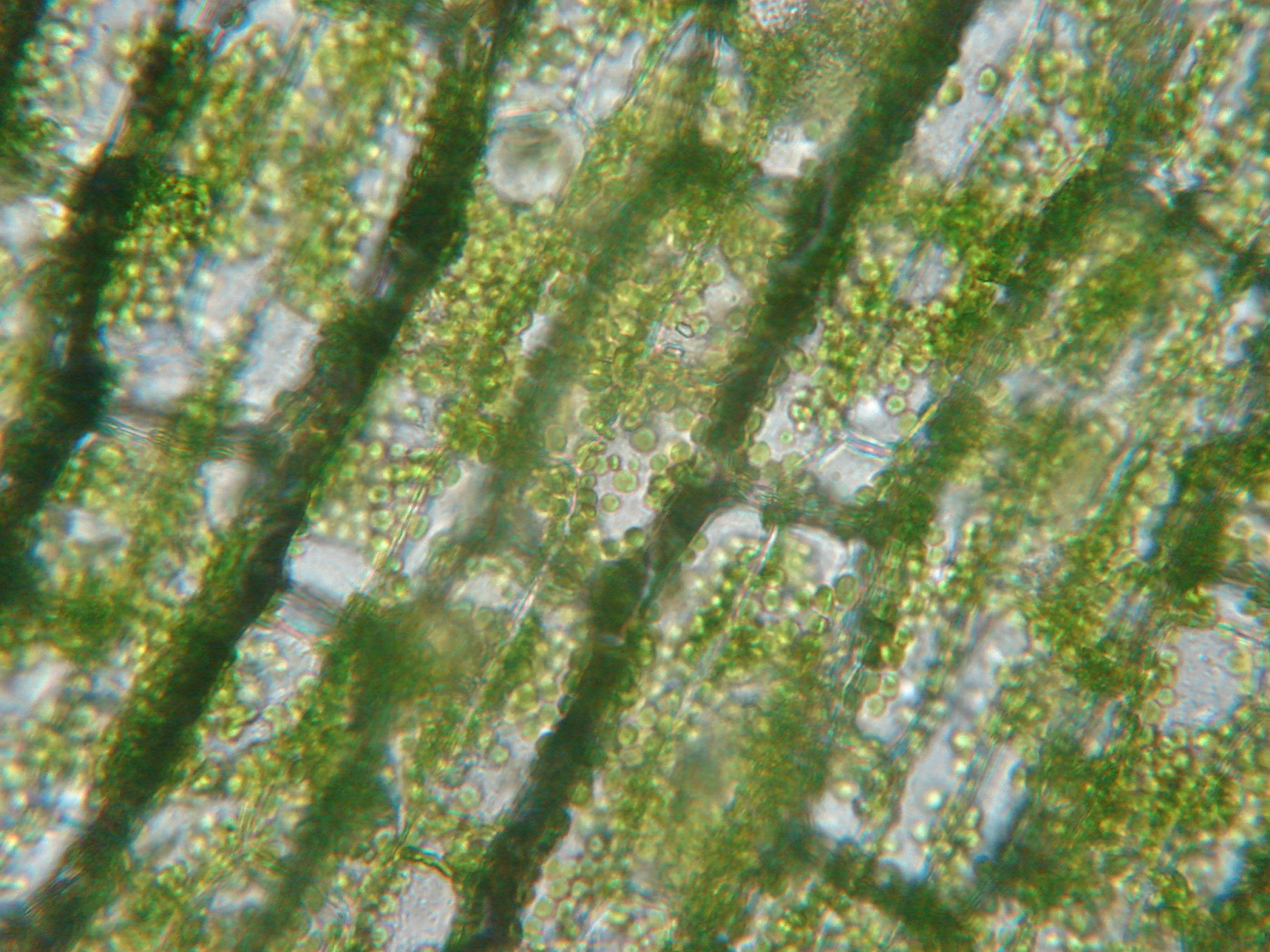 Vista de la clorofila desde un microscopio